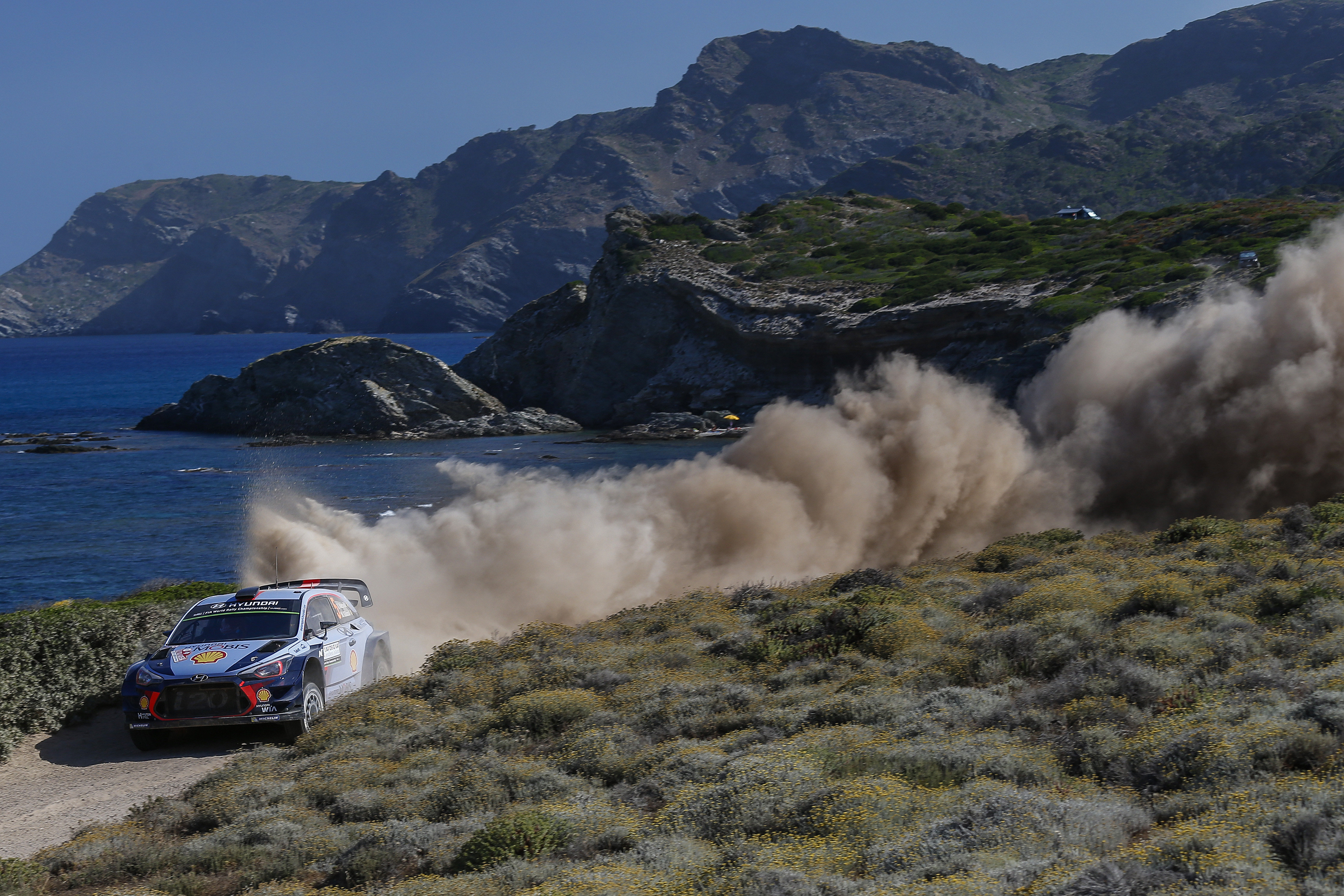 Thierry Neuville podczas Rajdu Sardynii 2017